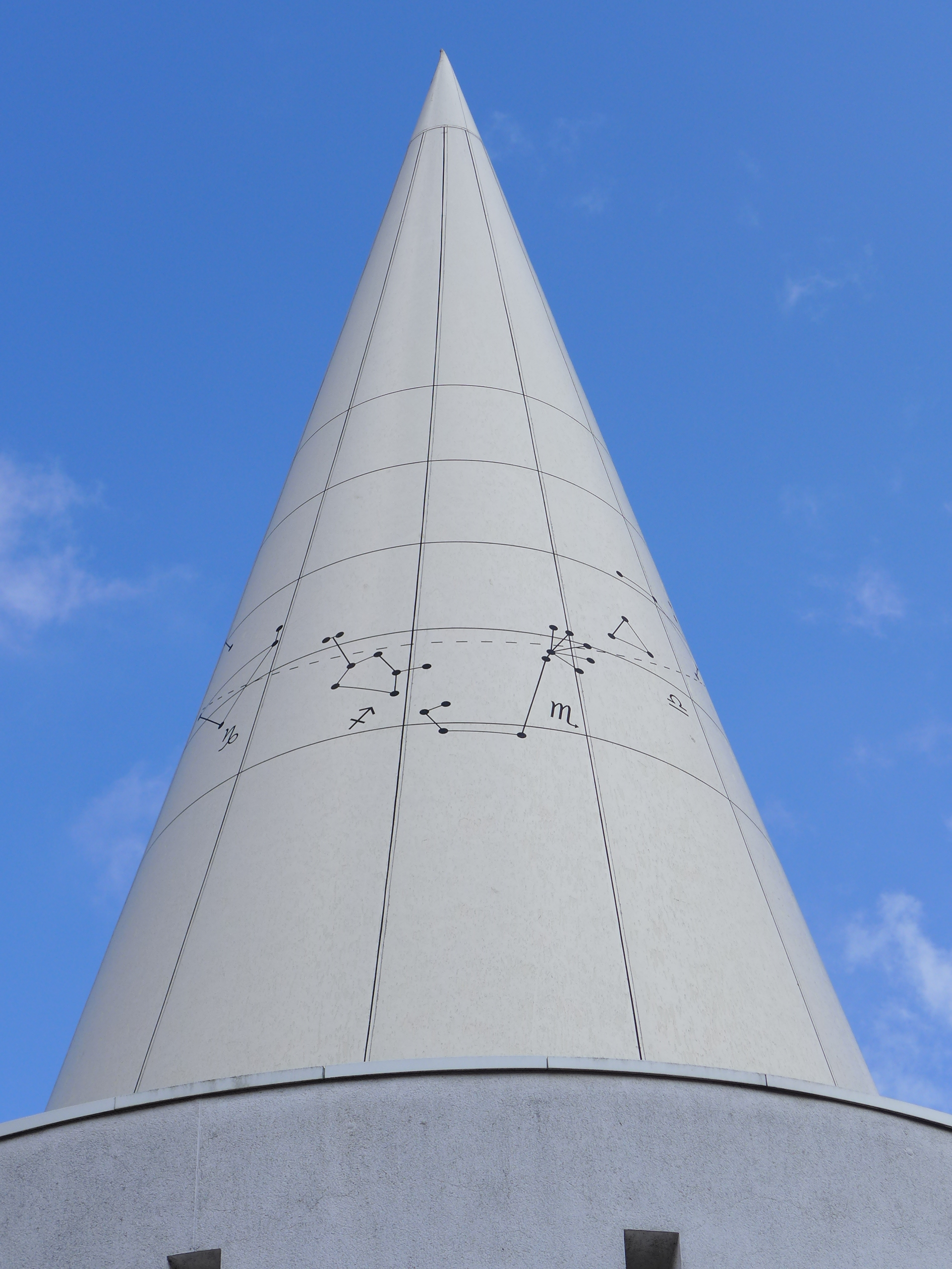 Kegelspitze des Ceres-Pavillons in Göttingen. Die gestrichelte Linie ist die von Carl Friedrich Gauß berechnete Bahn des Ceres.